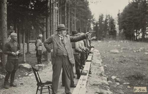 Presidentti Pehr Evind Svinhufvud ampumassa pistoolilla Kuopion ampumaradalla